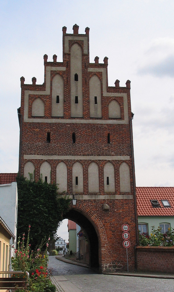 Beschreibung: Tribsees - Mühlentor Fotograf: Darkone, 23. August 2004